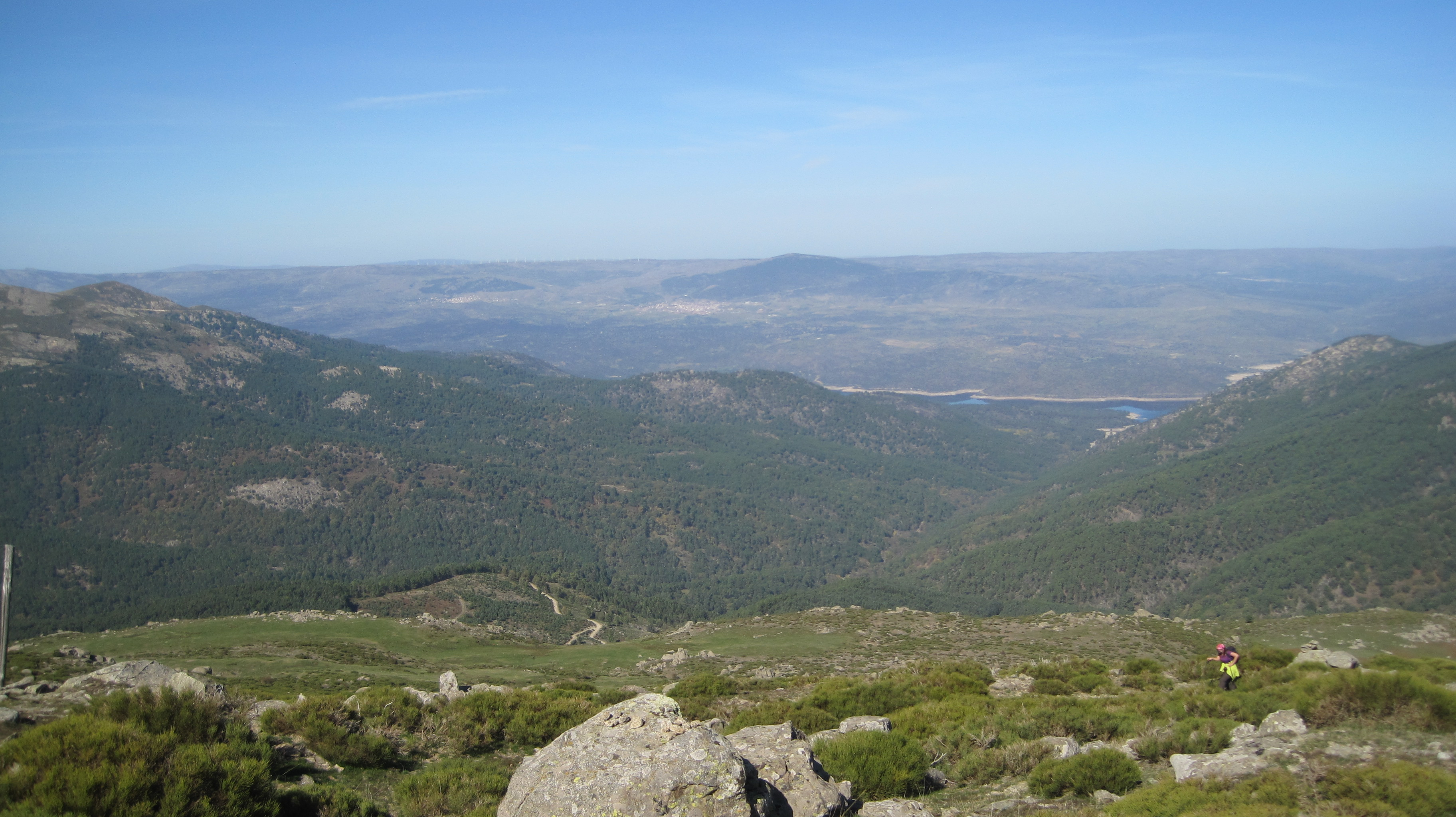 Vista del valle de Iruelas desde la cima del pico Casillas, en El Tiemblo (Ávila, España). Al fondo el embalse del Burguillo y la localidad de El Barraco.